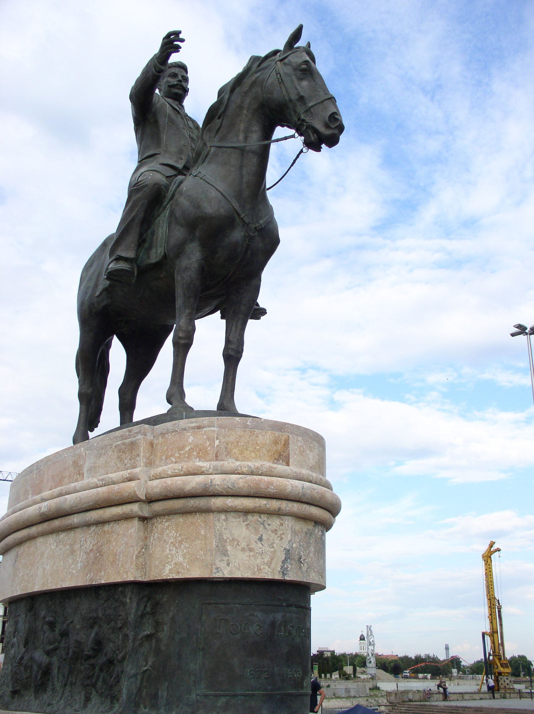 Spomenik Goce Delčevu postavljen u blizini Kamenog mosta u Skoplju